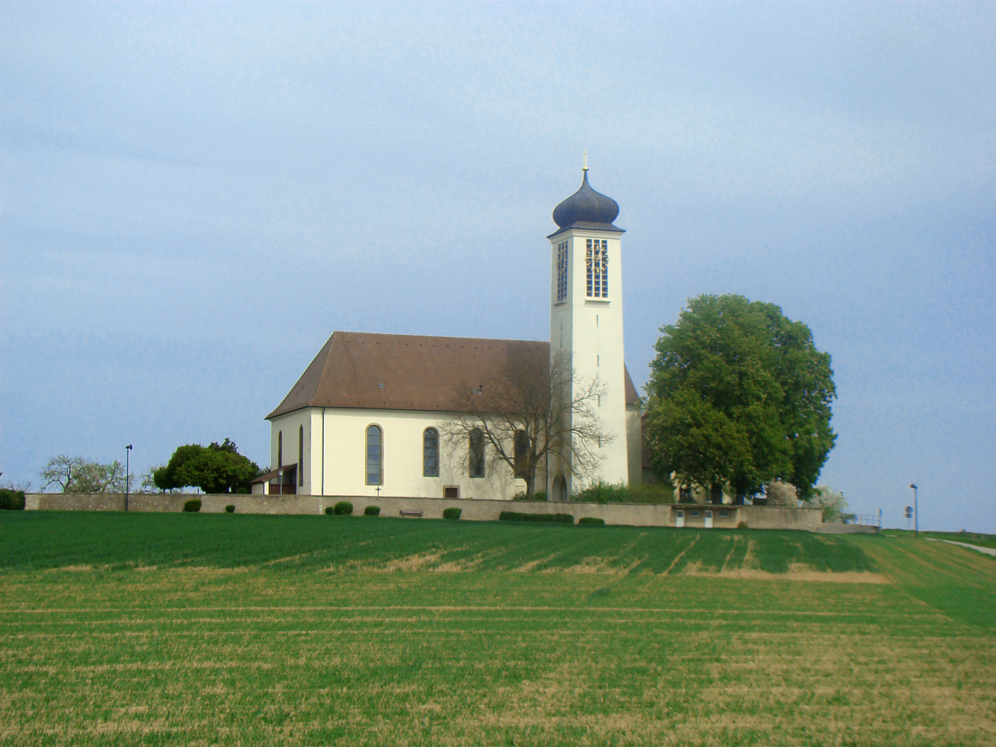 Wallfahrtskirche in Gundesheim-Höchstberg